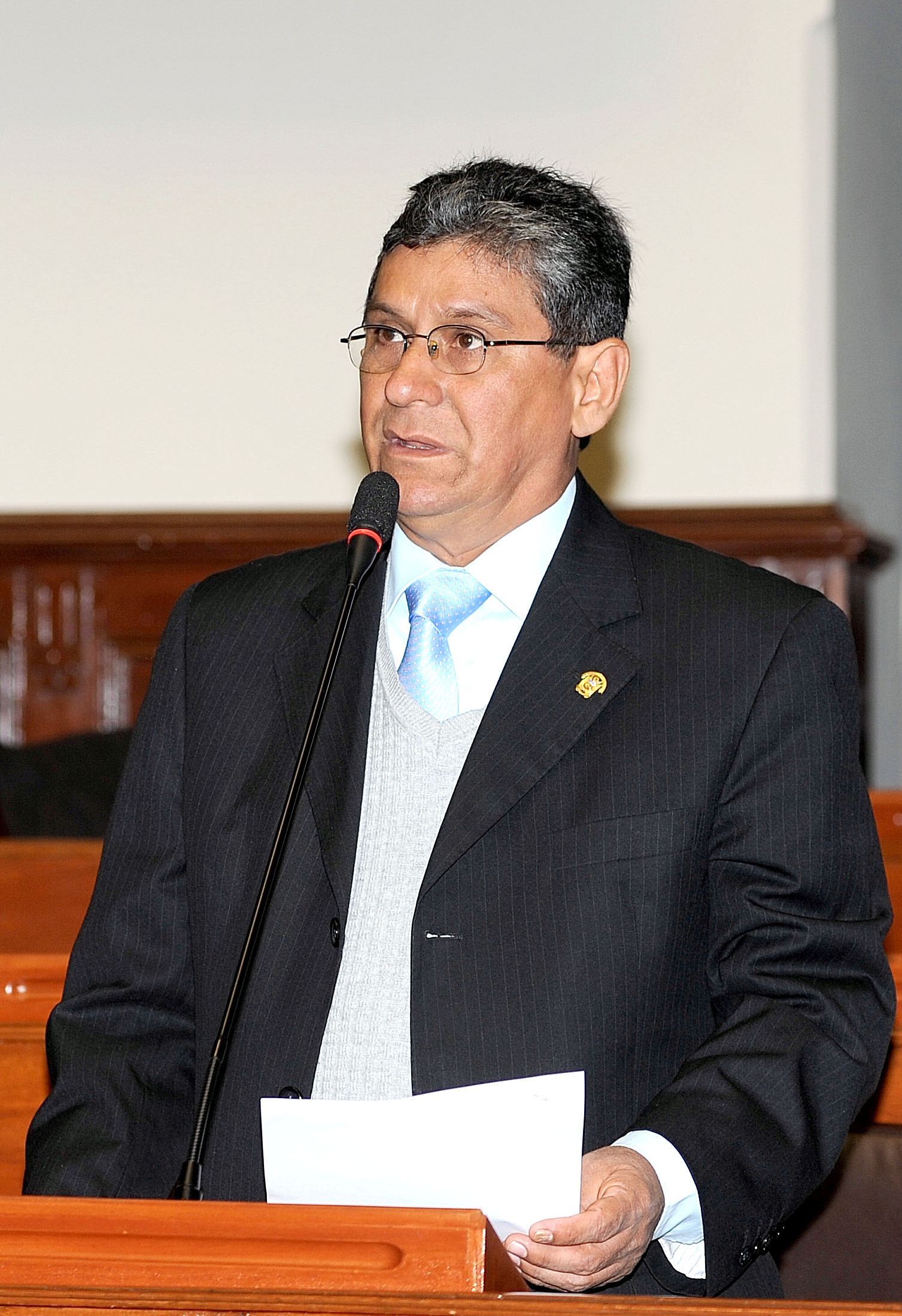 El congresista Jorge Foinquinos expresó su interés en que la construcción de la carretera Machu Picchu-Santa María permitirá el acceso de más turistas a la zona arqueológica del Perú.